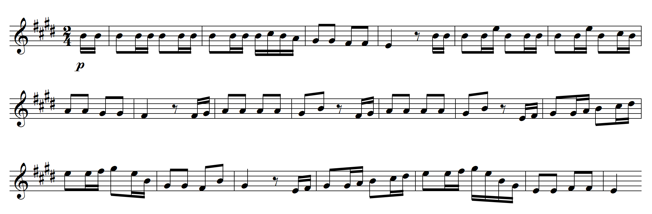 Hauptthema 3. Satz, Hummel Trompetenkonzert